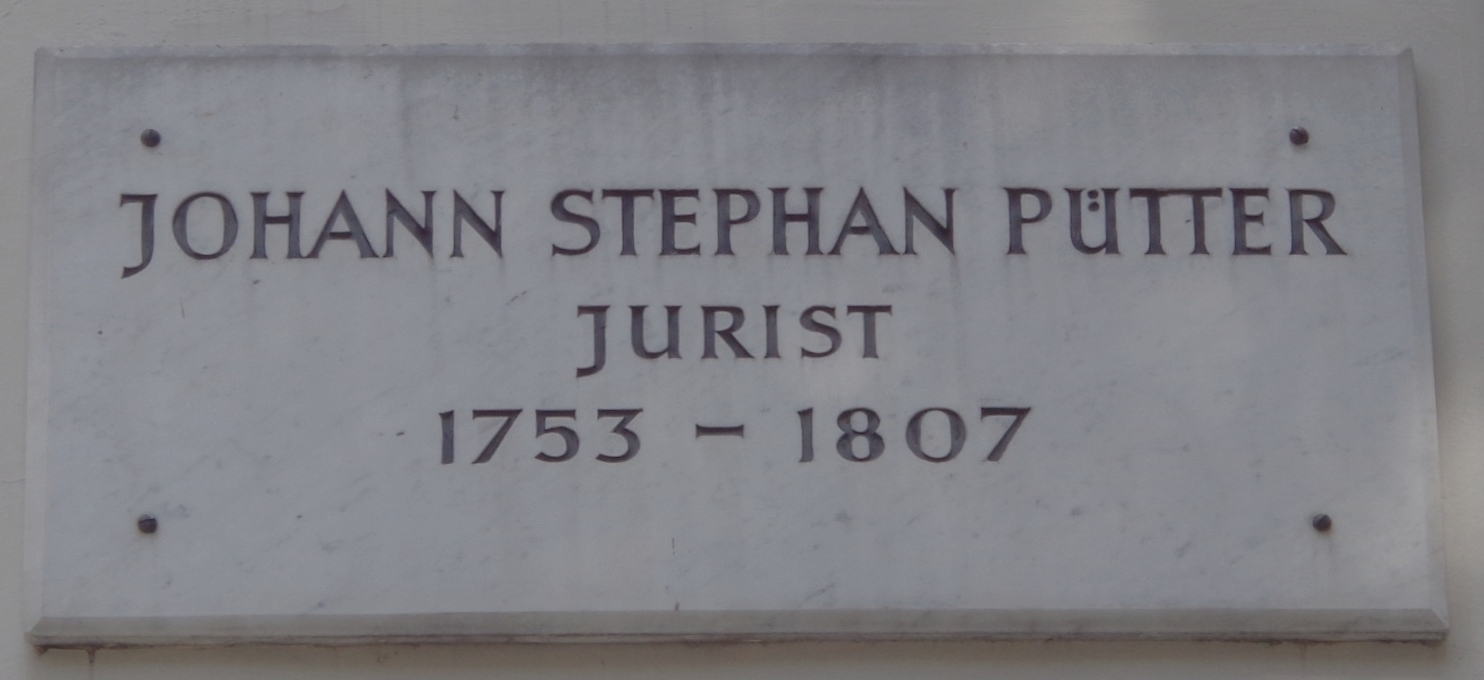 Göttinger Gedenktafel für Johann Stephan Pütter (Goetheallee 13)